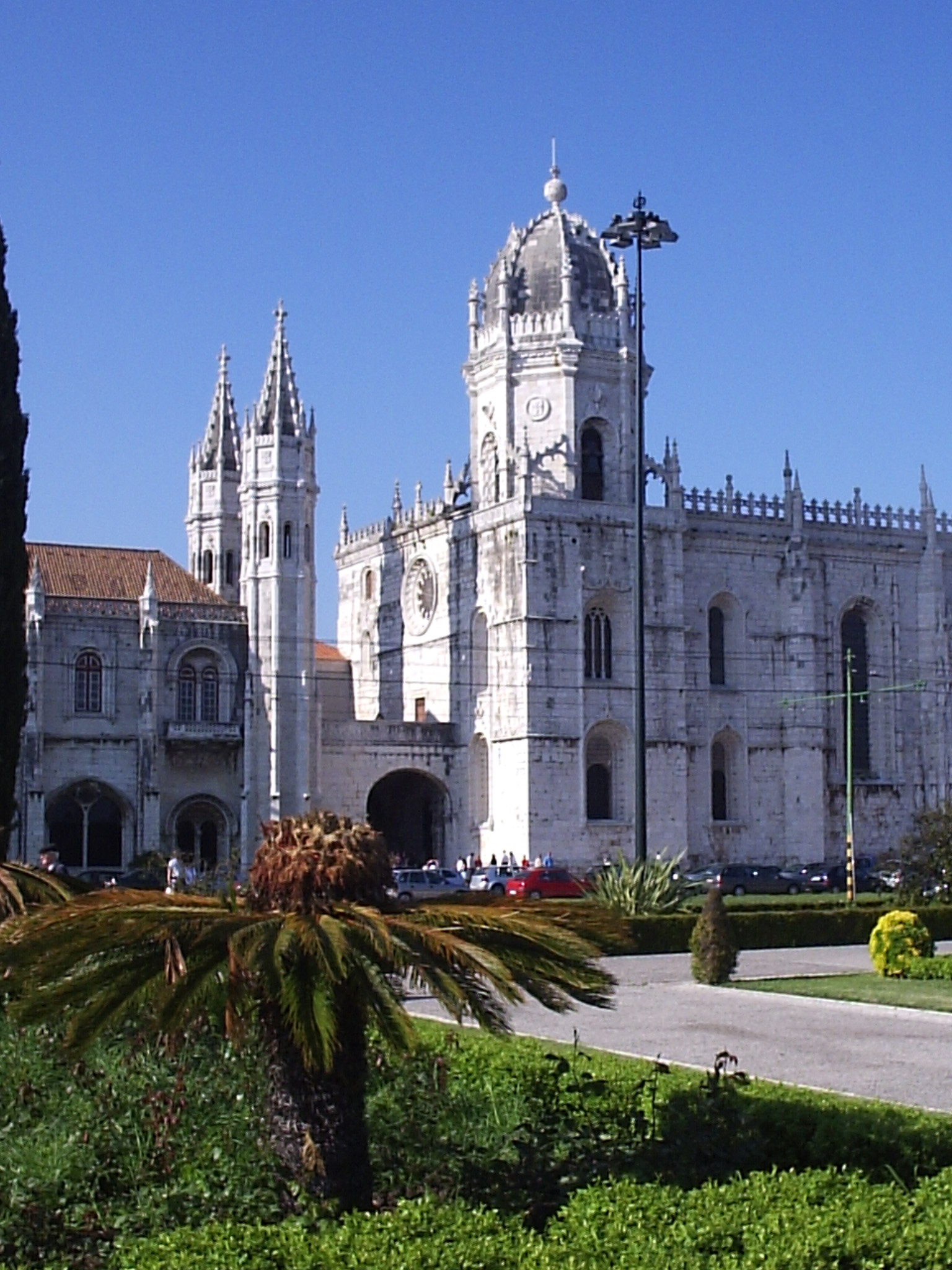 Mosteiro dos Jerónimos